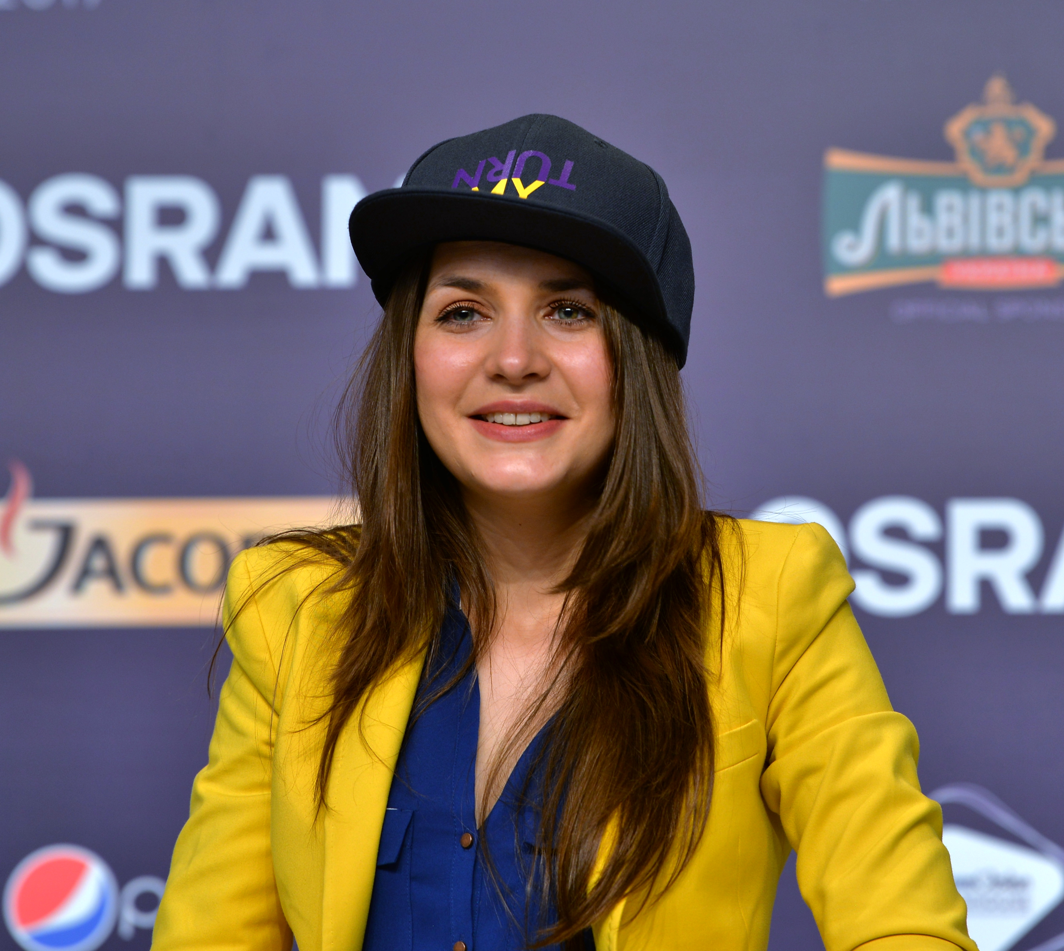 Чеська джазова співачка Мартіна Барта на пісенному конкурсі Євробачення 2017 у Києві